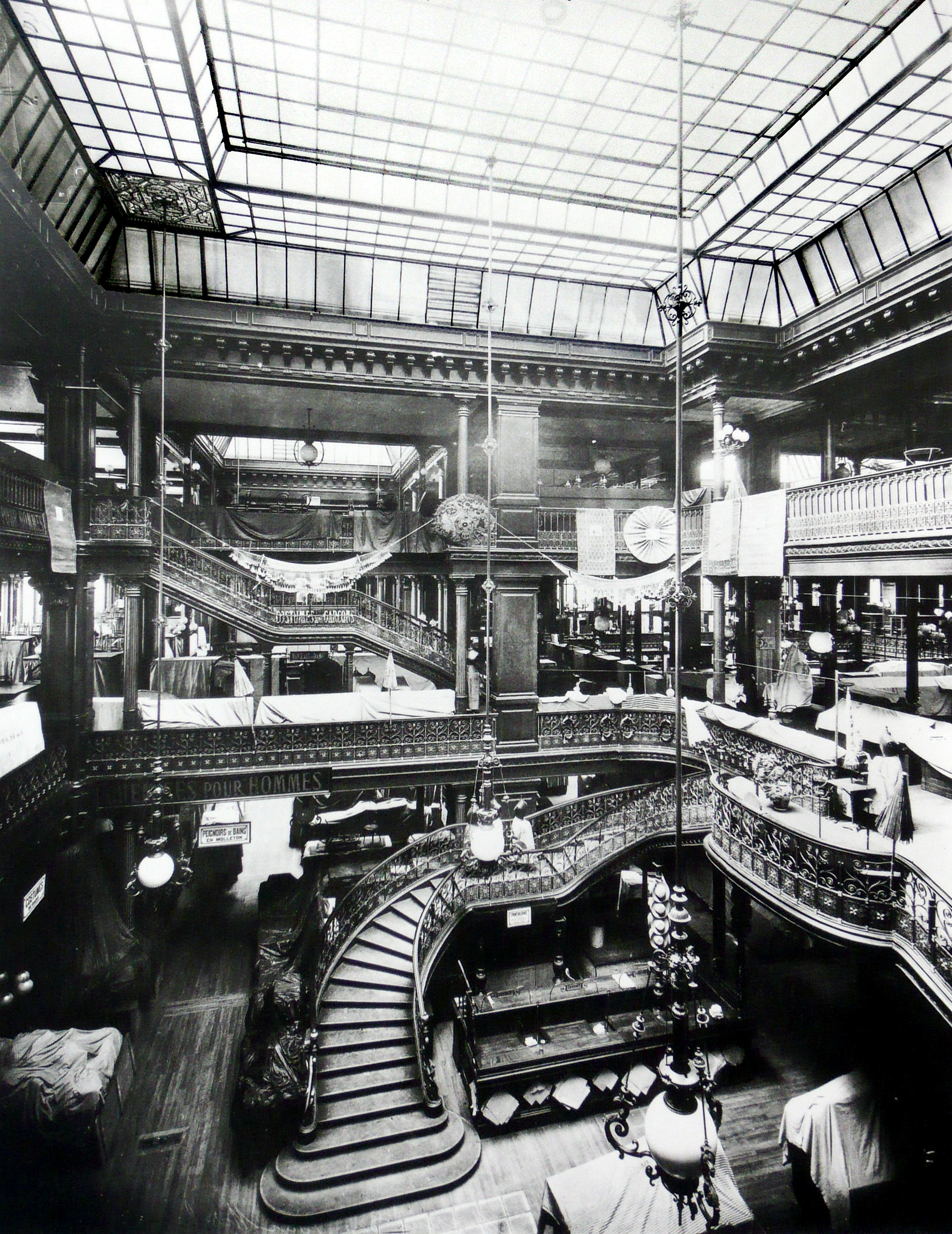 Intérieur du Bon Marché vers 1900, Grand escalier et serrurerie Moisant, Laurent, Savey.